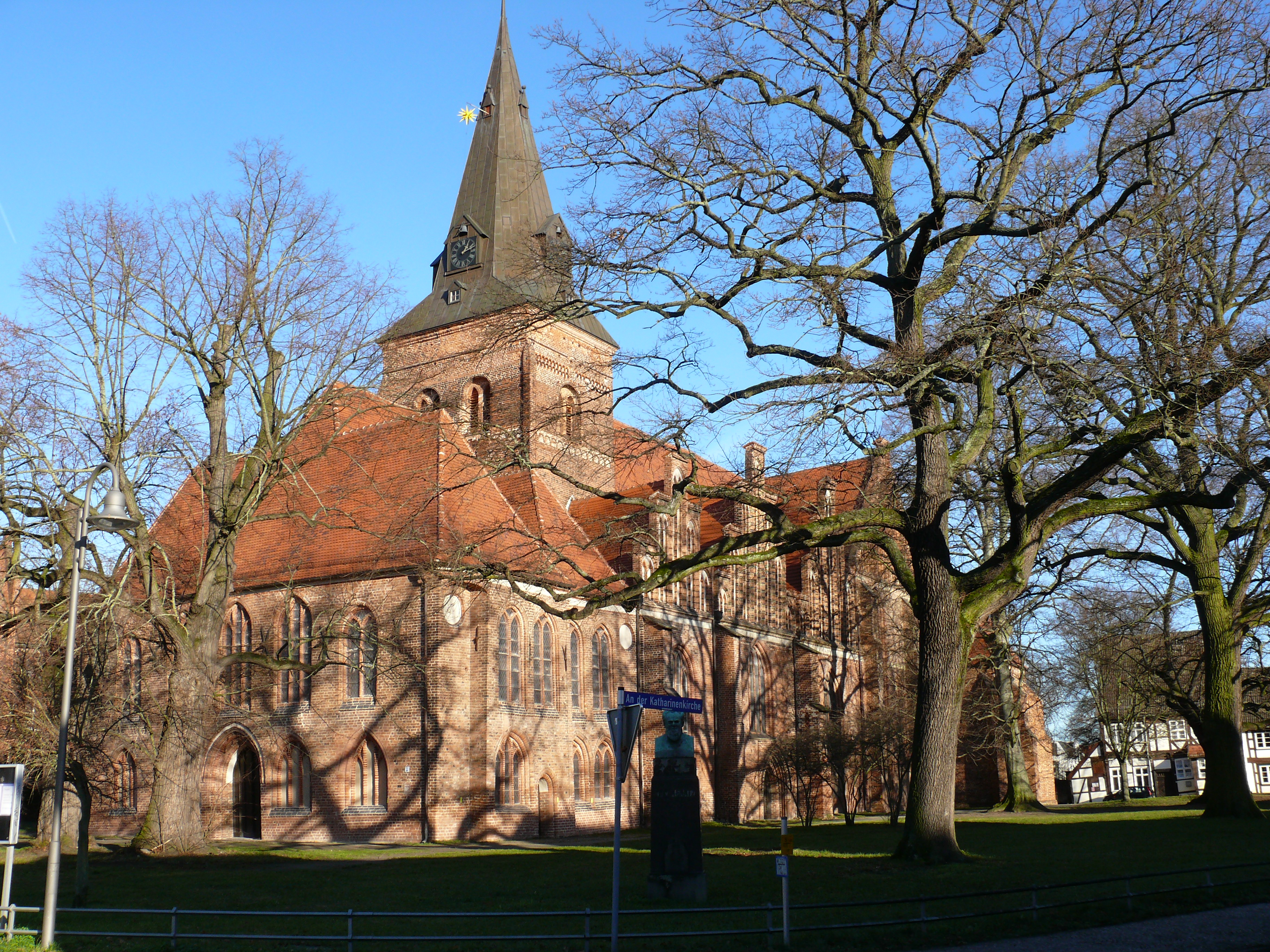 Die Katharinenkirche in der Hansestadt Salzwedel.